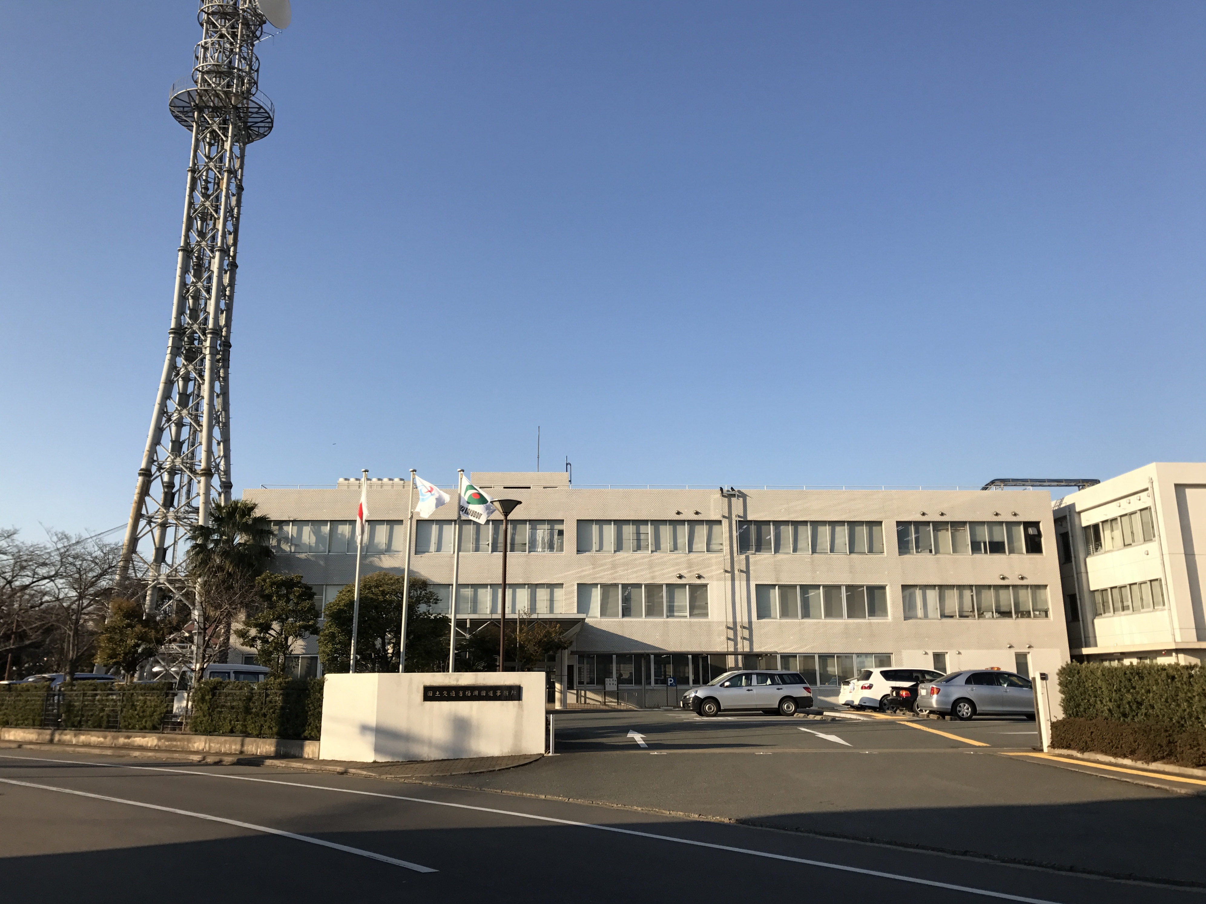 国土交通省福岡国道事務所